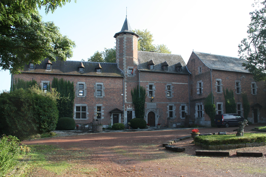 Het kasteel van Gruitrode